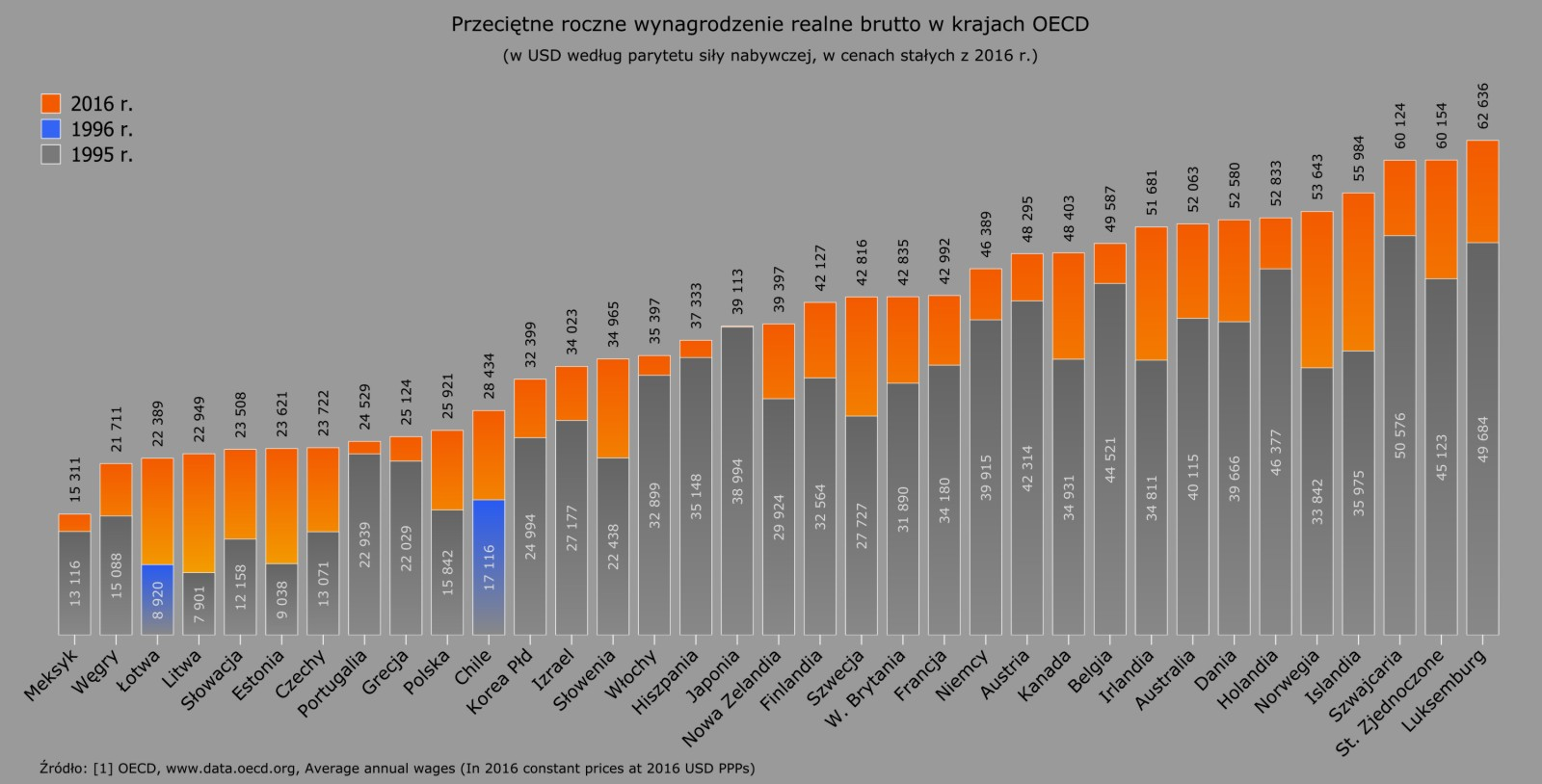 Przeciętne roczne realne wynagrodzenie brutto w dolarach międzynarodowych w krajach OECD Źródło: OECD, Average annual wages